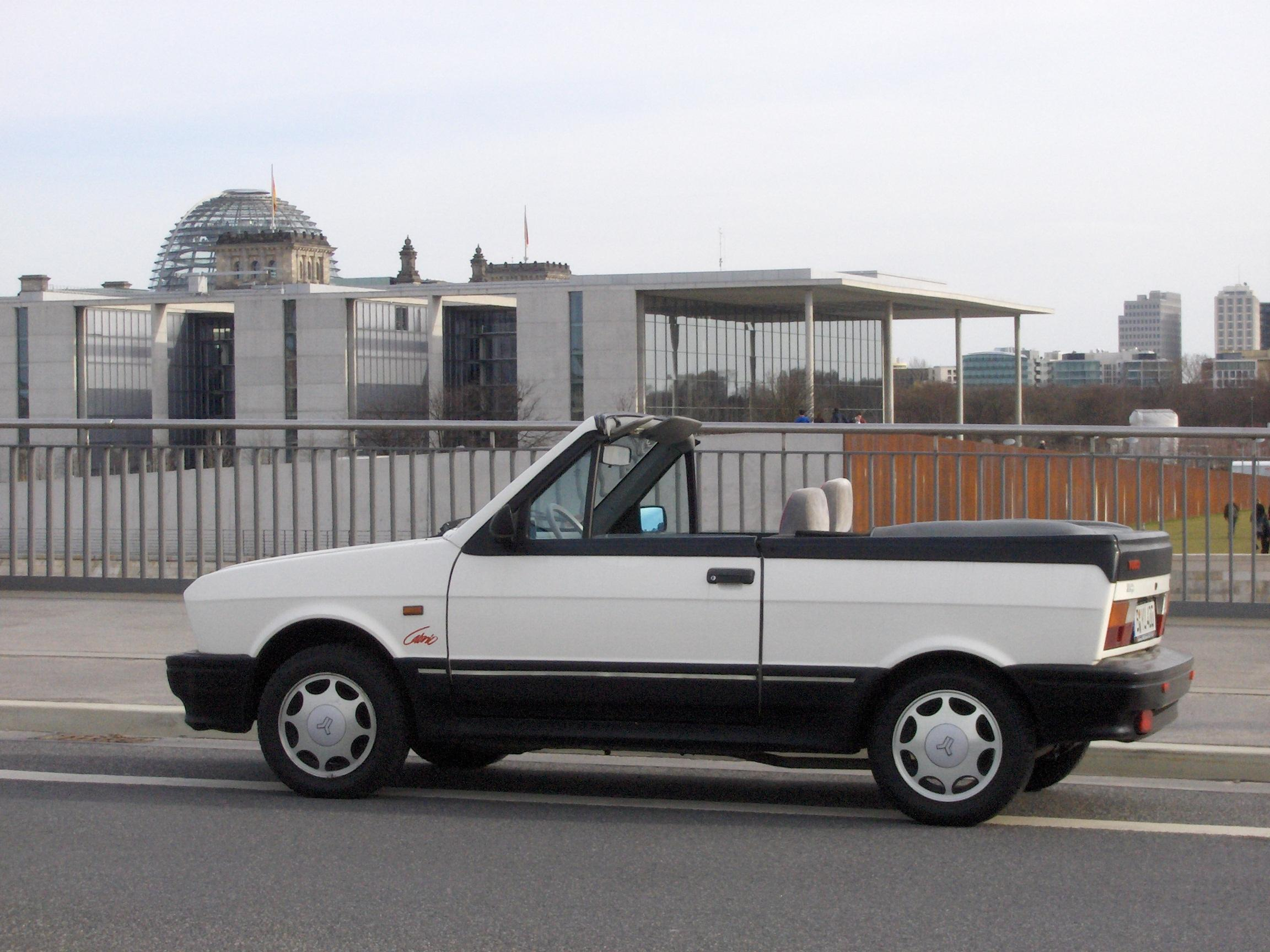 Privater Yugo Karol Cabrio eines freundes, Foto von Made in Yugoslavia siehe auch Bild:YugoCabrio.JPG